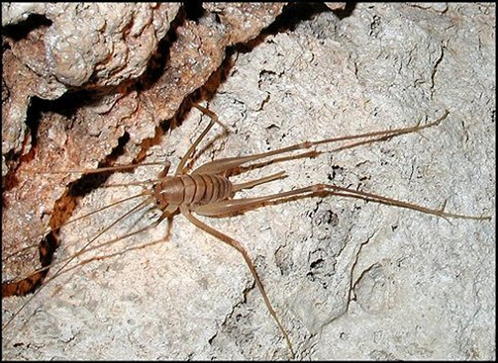 Femelle de Dolichopoda linderi dans la grotte du Gourp des Boeufs